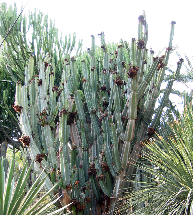 Cereus Peruvianus en el Huerto del Cura.